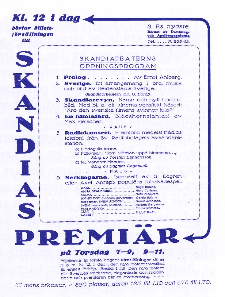 Flygblad till invigningen av biografen Skandia i Stockholm 1923